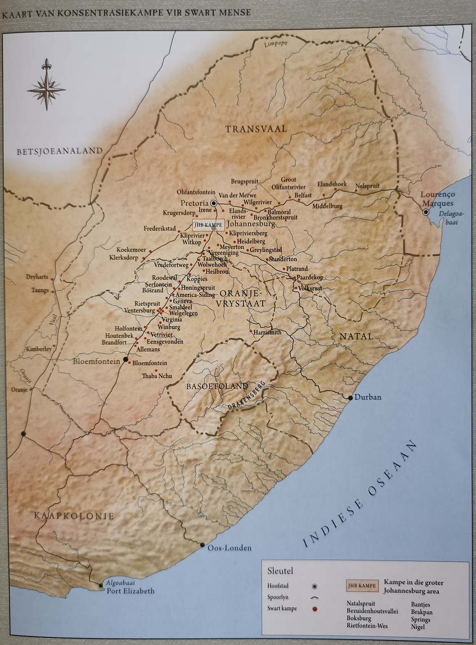 Krediet: Pretorius, F. (red.). 2017. Verskroeide Aarde. Tafelberg Uitgewer: Kaapstad